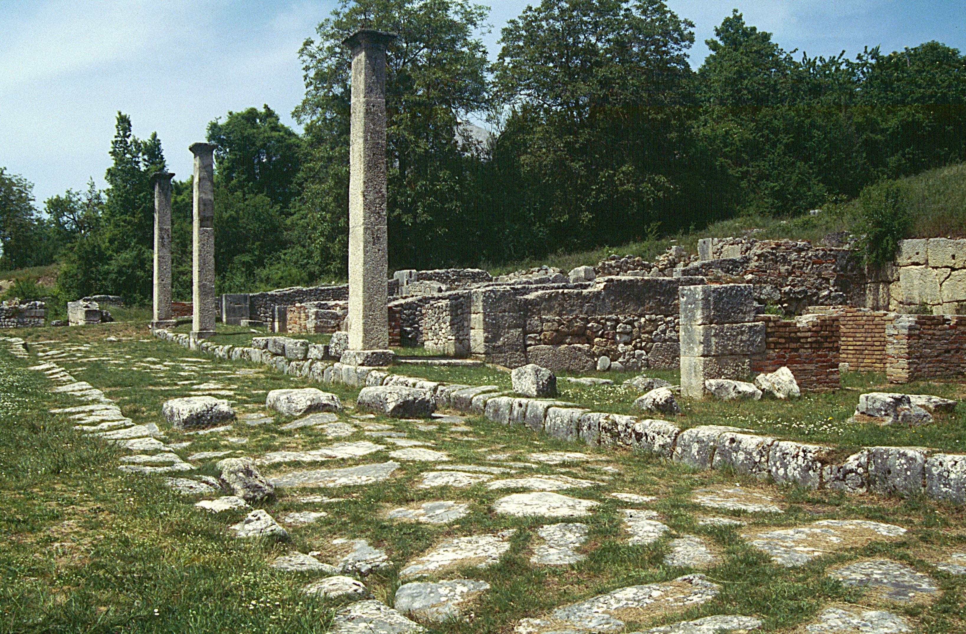 Alba Fucens bei Massa d'Albe